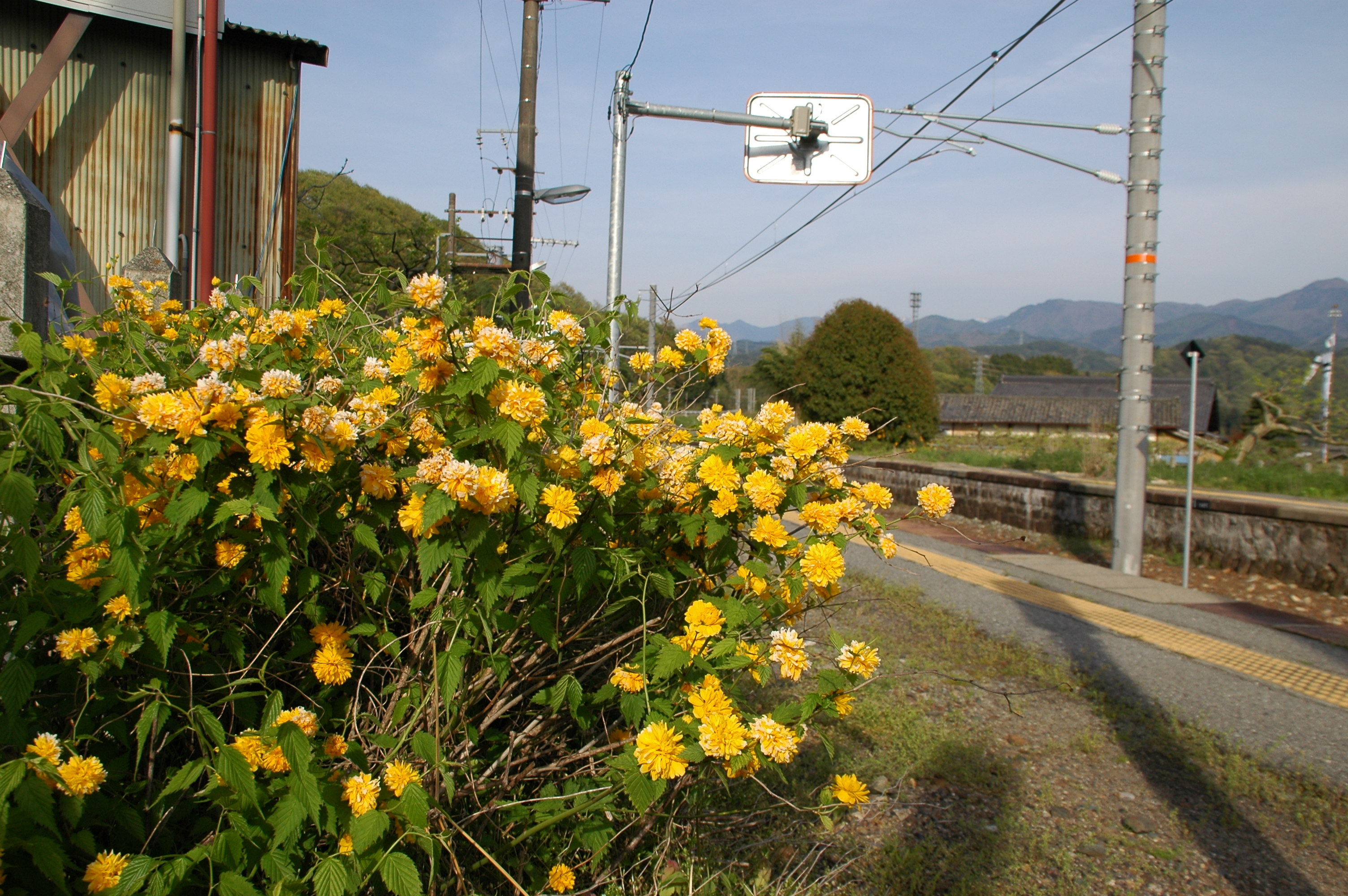 飯田線山吹駅のヤマブキ